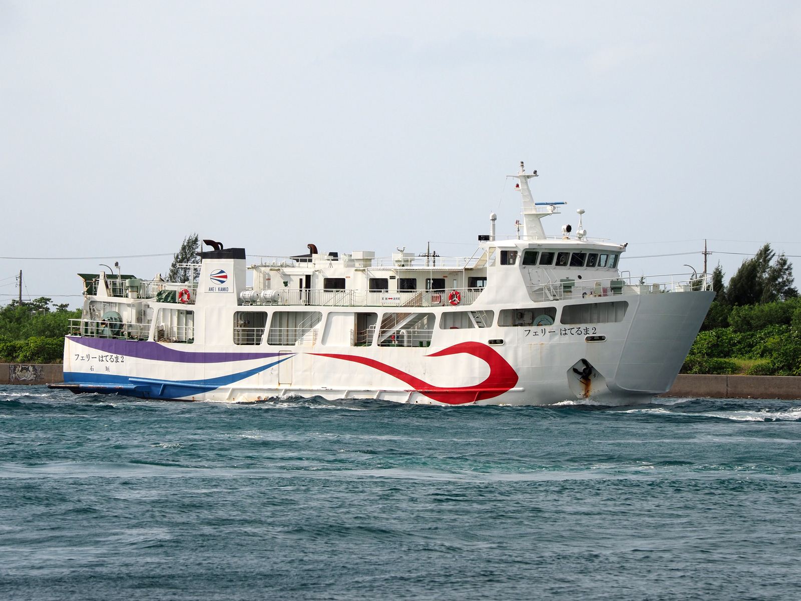 フェリーはてるま2（安栄観光、石垣港沖にて）